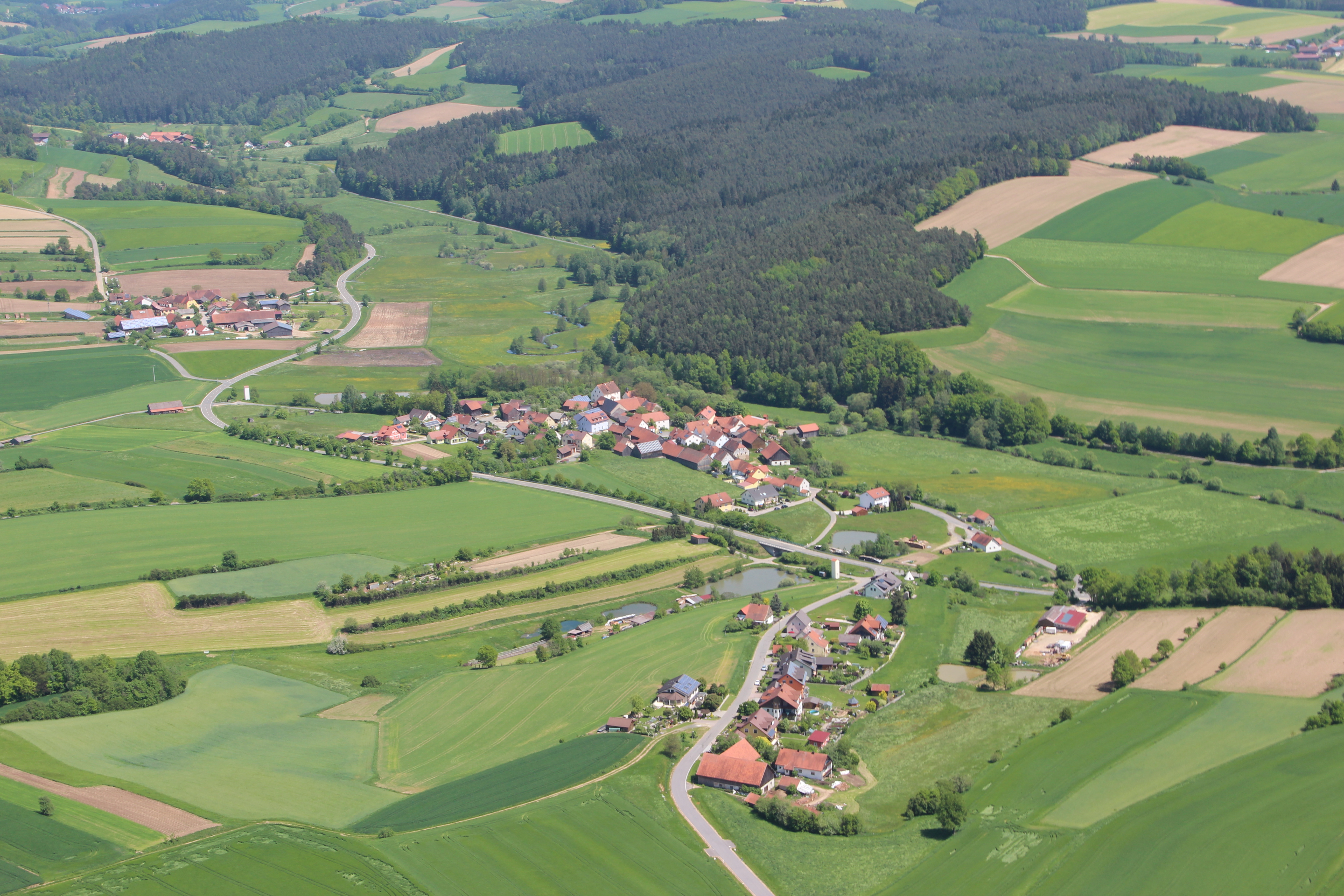 Fronhof (Gemeinde Altendorf), Landkreis Schwandorf, Oberpfalz, Bayern; im Hintergrund am linken Bildrand Siegelsdorf (2013)